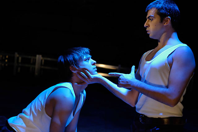 Moja fotografija.